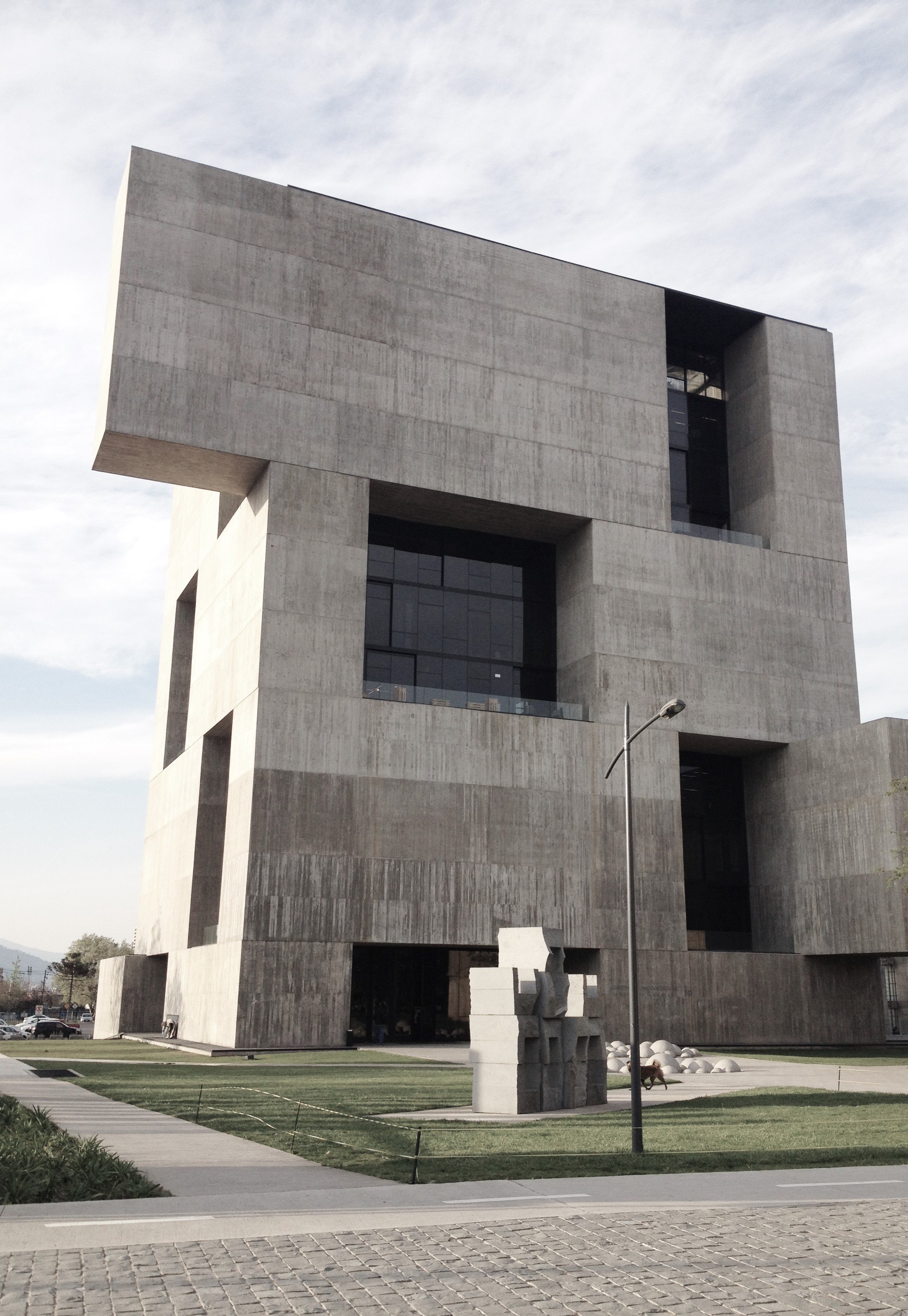 edificio Anacleto 2015-09-29 18.33.06